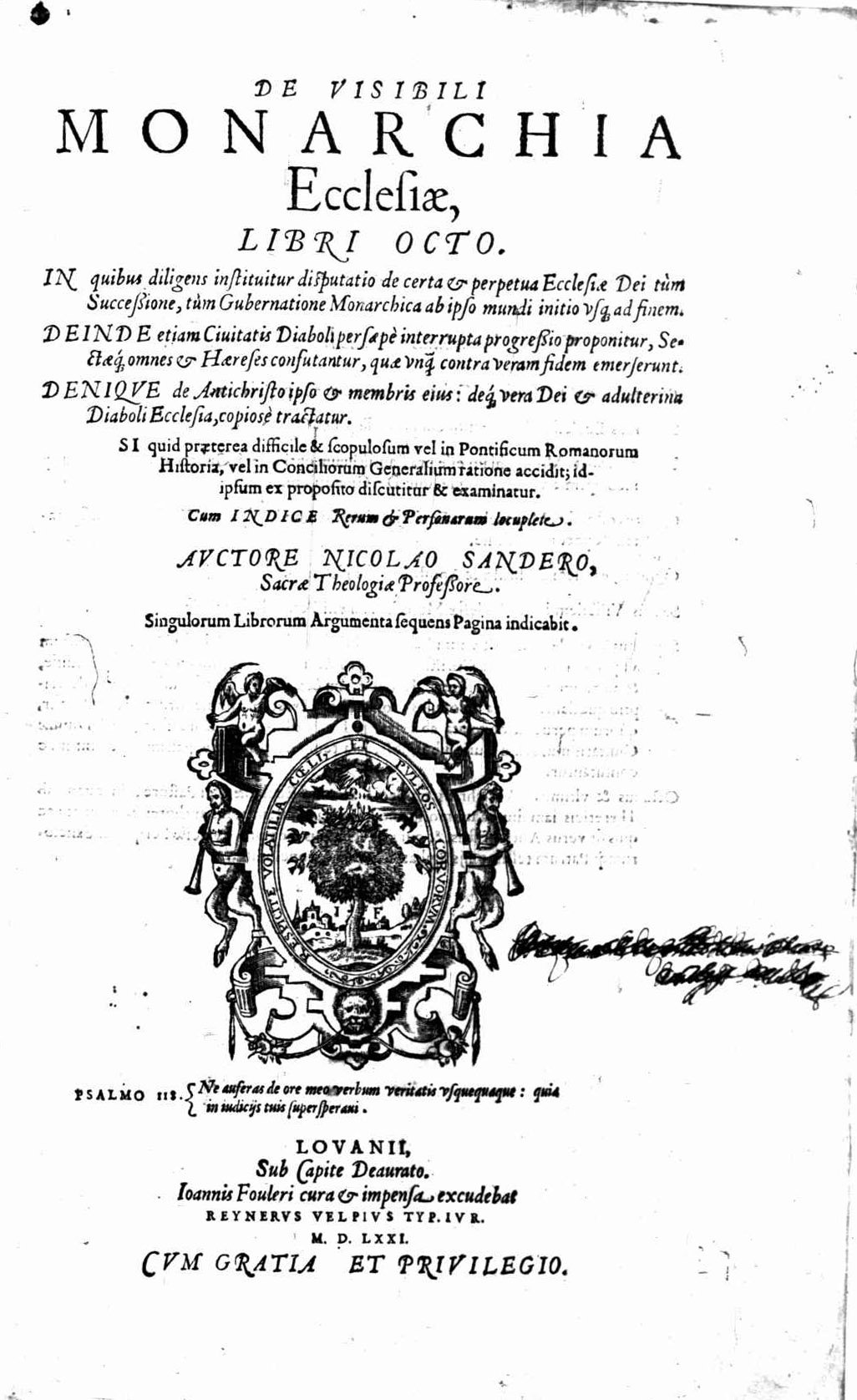 Frontespizio